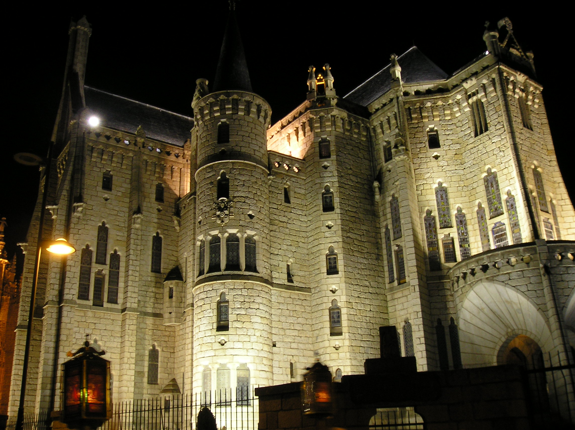 Palacio Episcopal de Astorga de noche